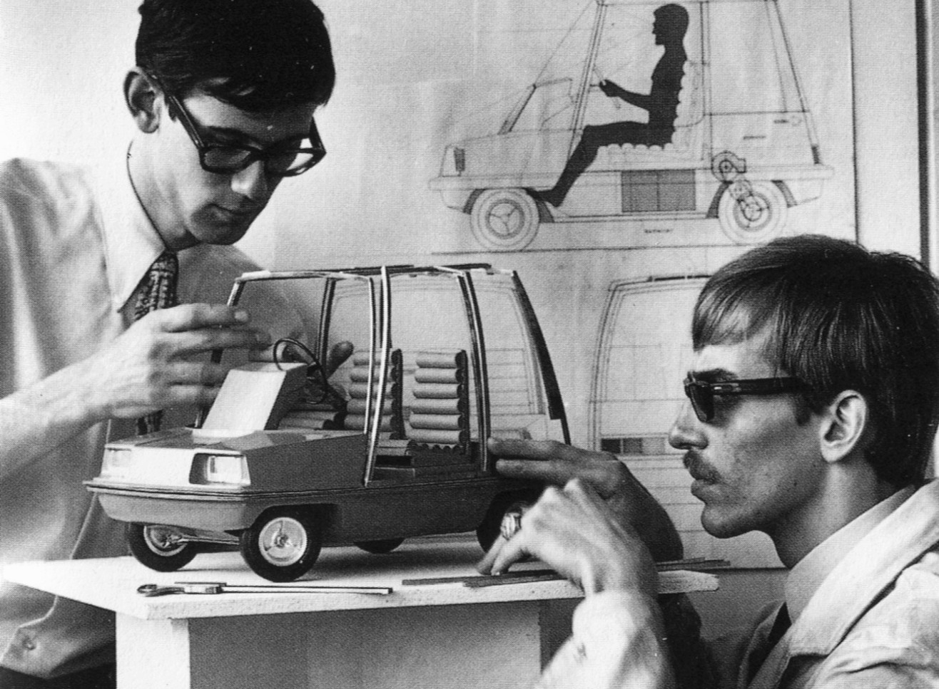 Hans Ehrich (höger) och Roland Lindhé med examensarbetet "Optima"